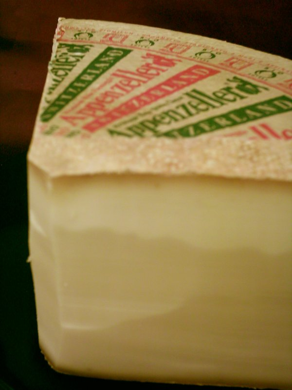 Fromage Appenzeller, originaire de la région appenzelloise (Suisse).